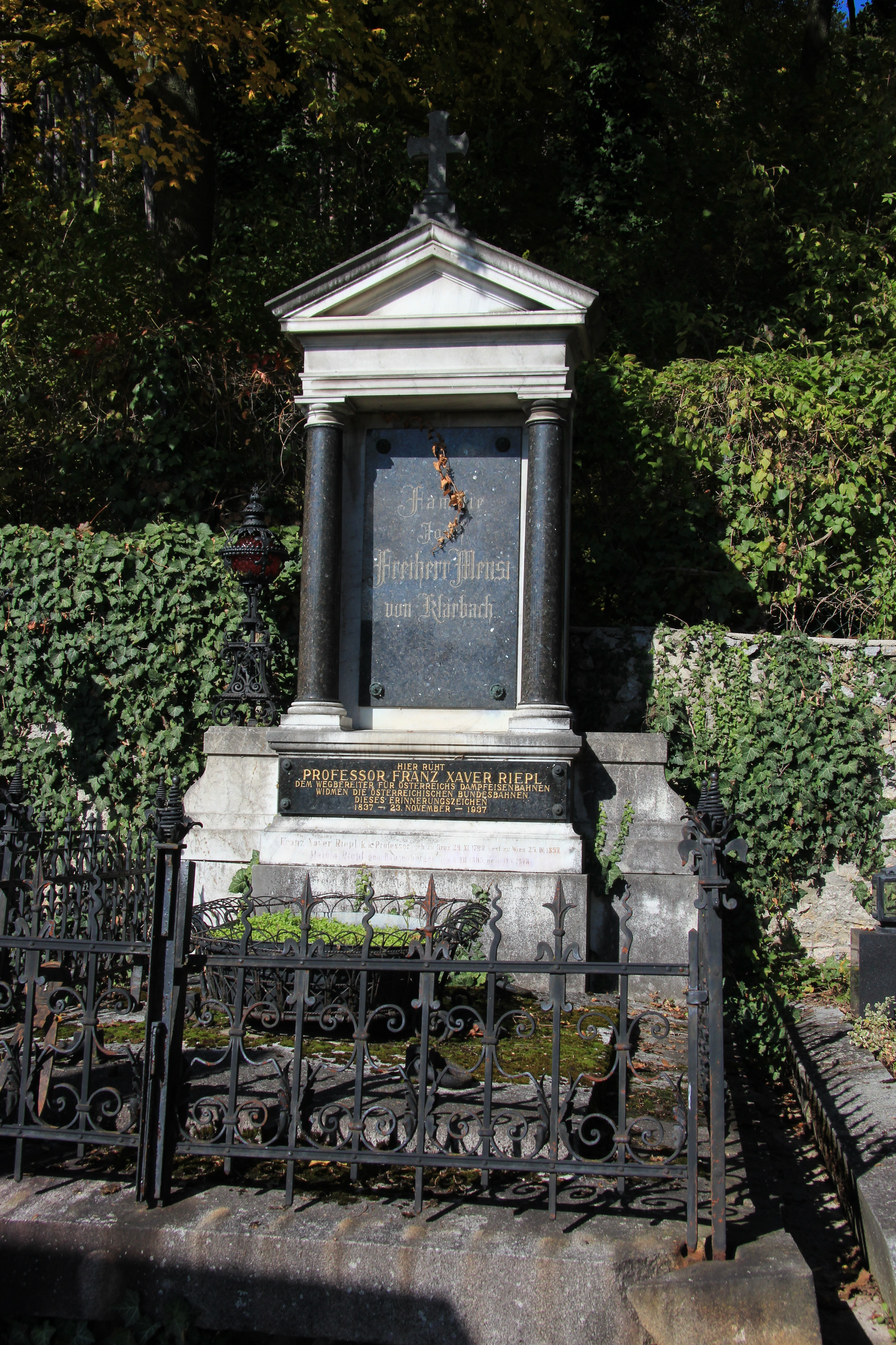 Grabstelen der Familien Corra, Mensi von Klarbach und Franz Xaver Riepl am Friedhof Hinterbrühl, Niederösterreich